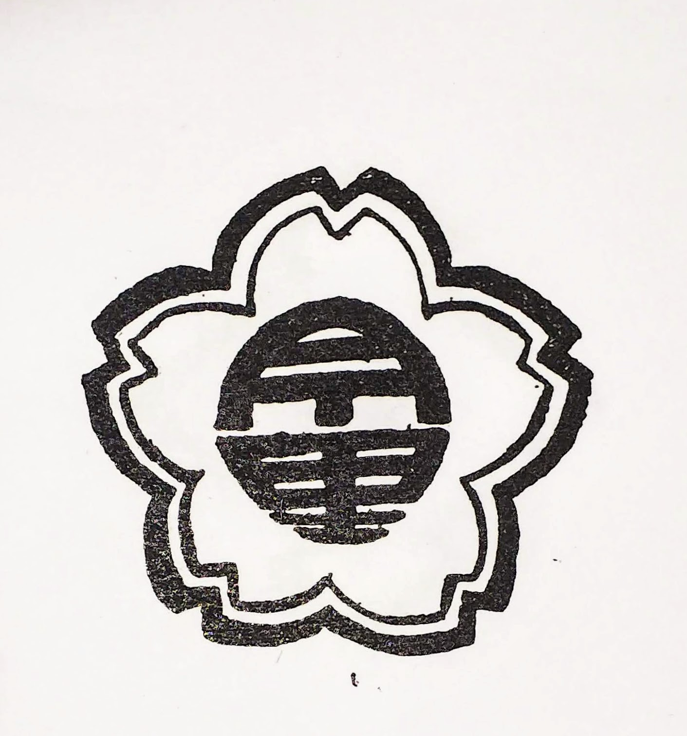 今里新地 紋章